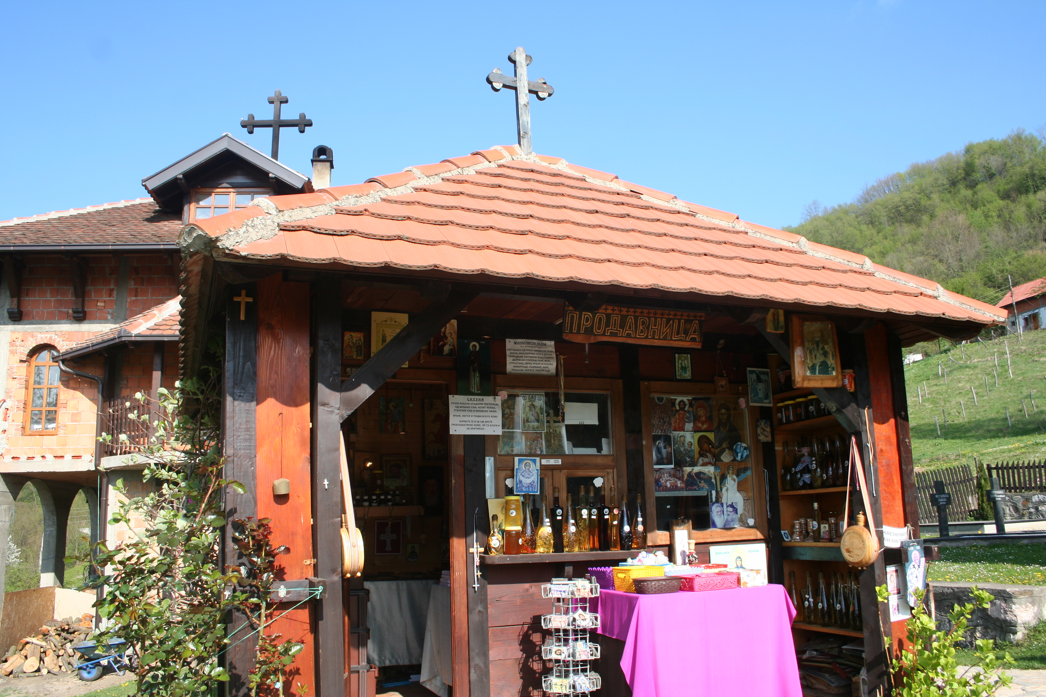 Manastir Bjele vode